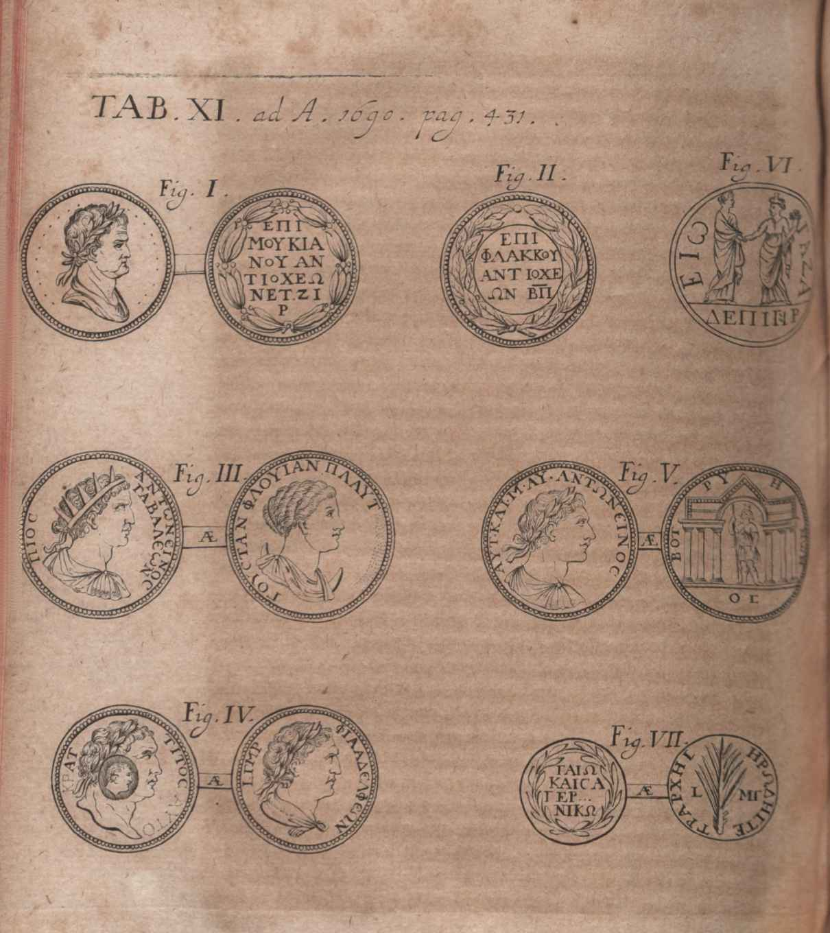 Illustration